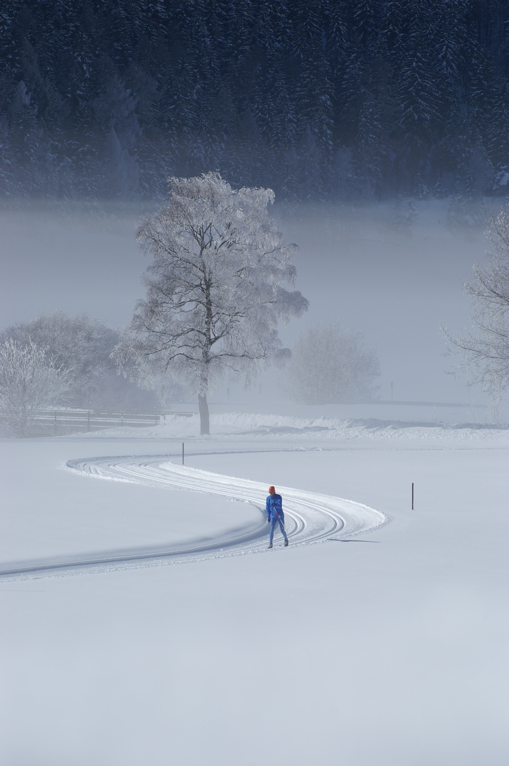 Winter am Achensee in Tirol.